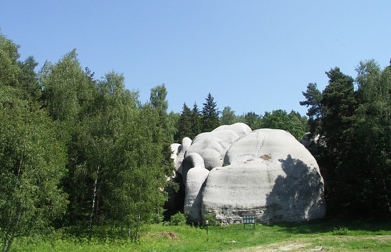 Bílé kameny ,Lusatian Mountains, Czech Republic